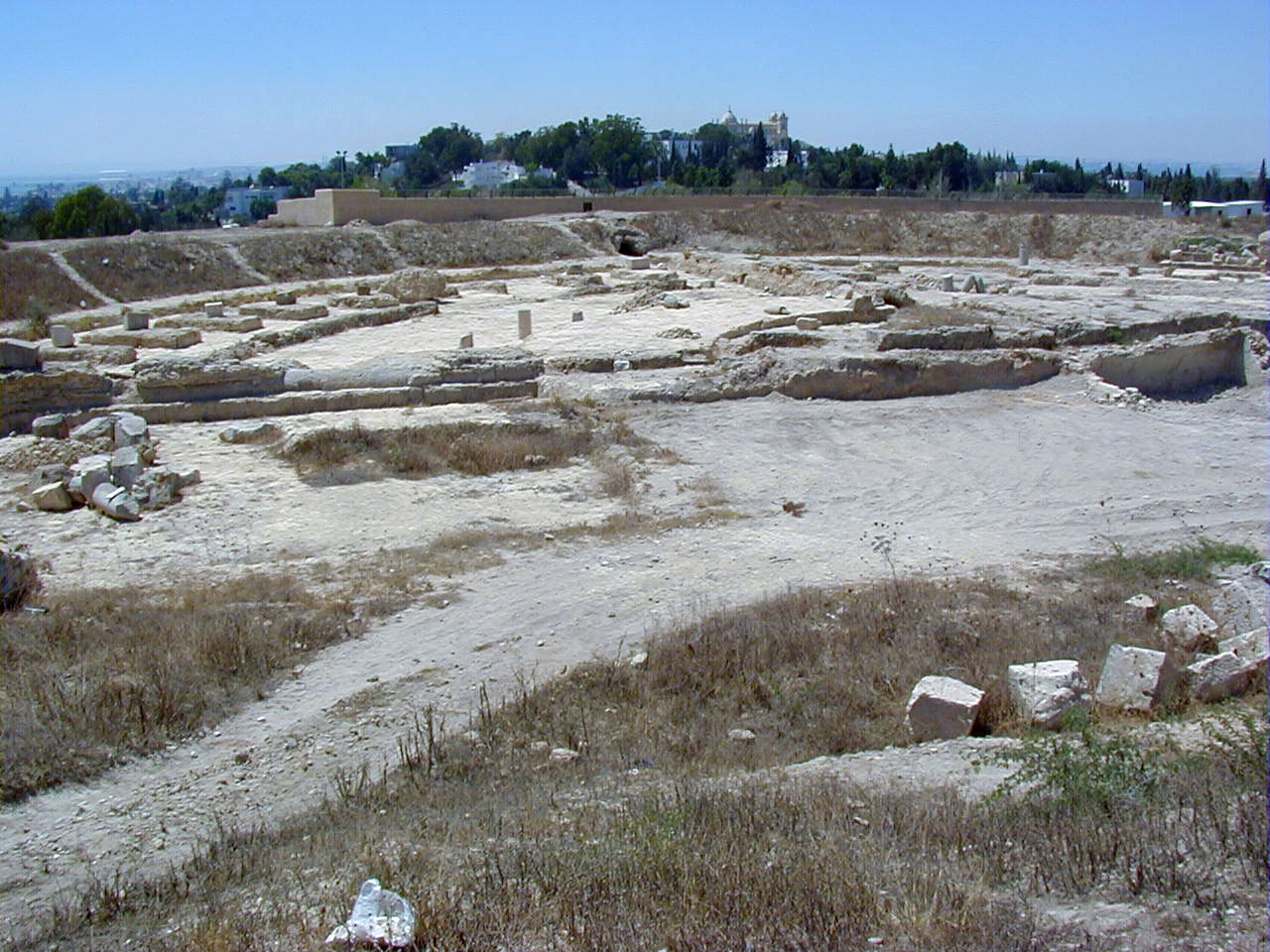 ruines de l'odeon de Carthage